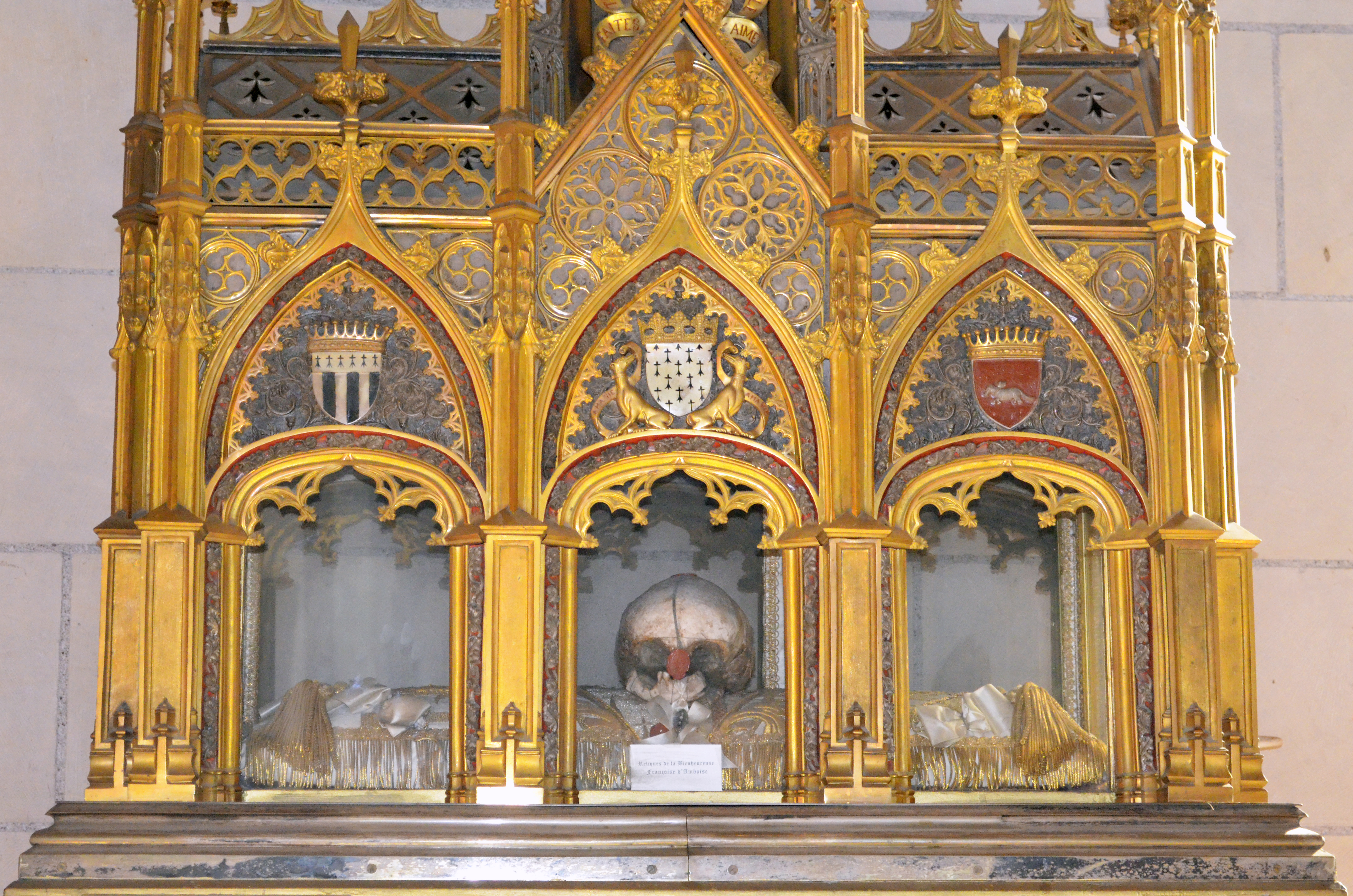 Reliquaire de Françoise d'Amboise présent dans la chapelle de la sacristie de la Cathédrale Saint-Pierre-et-Saint-Paul - Nantes (Loire-Atlantique)